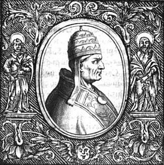 Papež Řehoř IX.